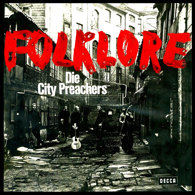 1965 - Die City Preachers Folklore LP 1 (Teldec)